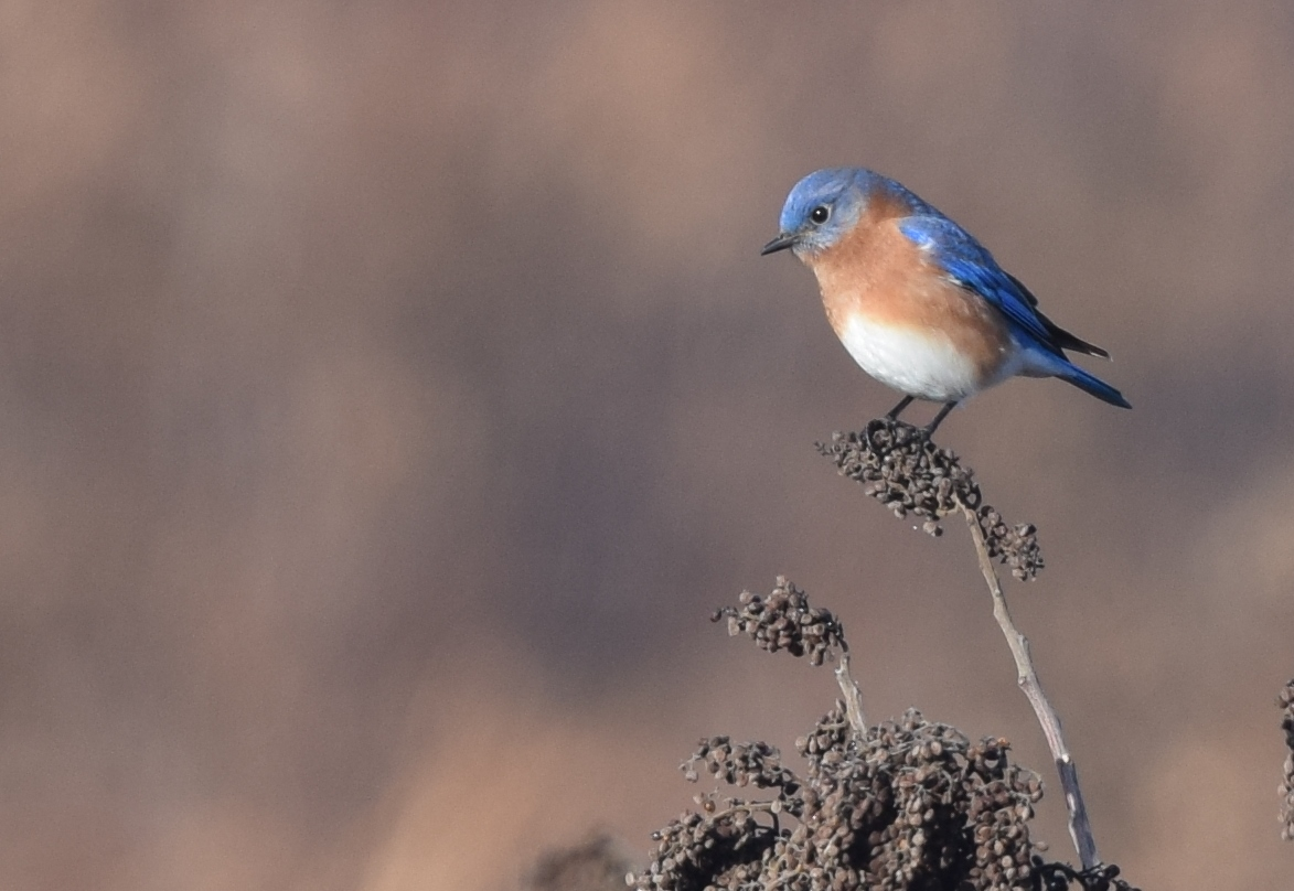 Prairie State Park